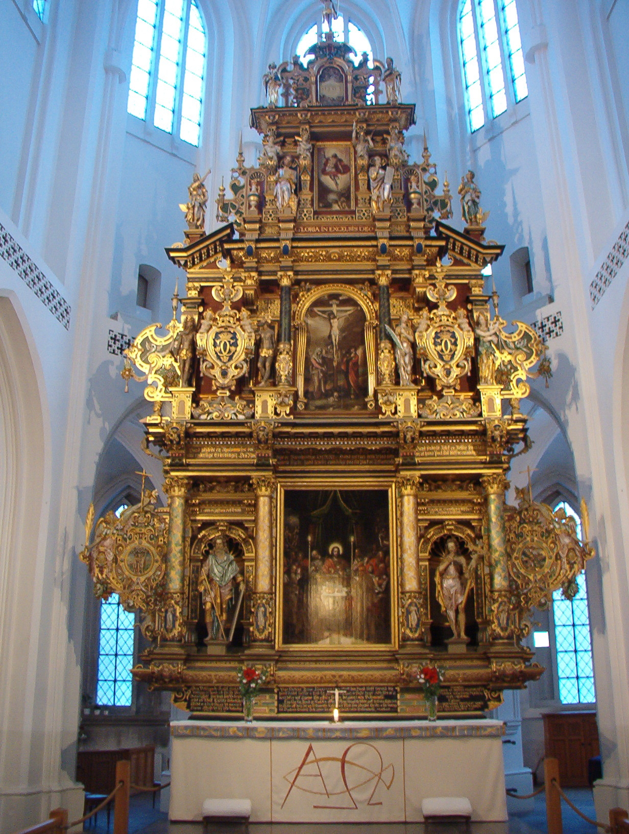 Sankt Petri kyrka, Malmö, altar piece.jpg. Date:December 2005